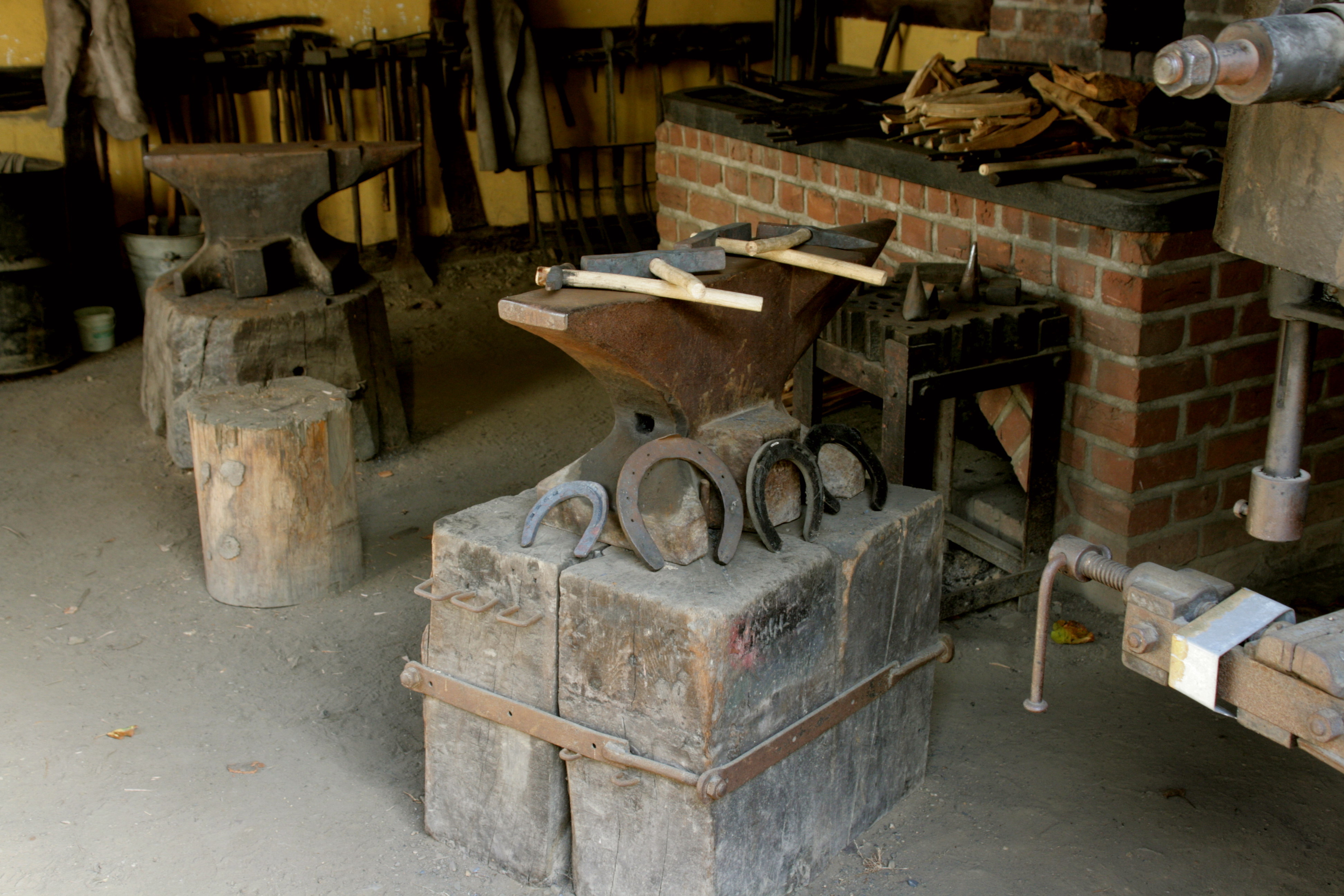 Grobschmiede aus Braunsberg, Bergisch Gladbach, im Bergischen Museum für Bergbau, Handwerk und Gewerbe, Burggraben 9-21 in Bergisch Gladbach